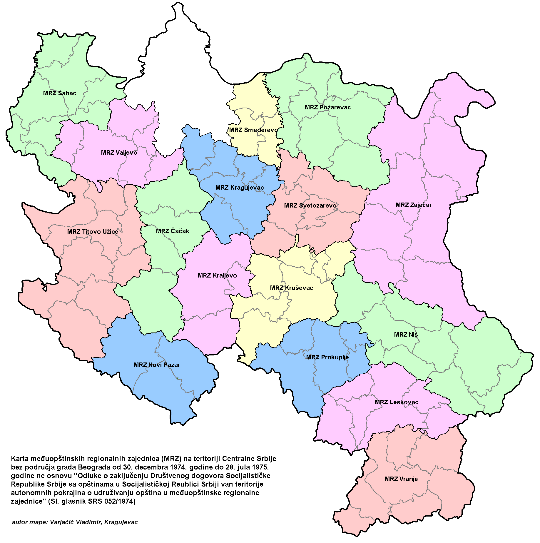 Међуопштине регионалне заједнице у СР Србији 1974. године